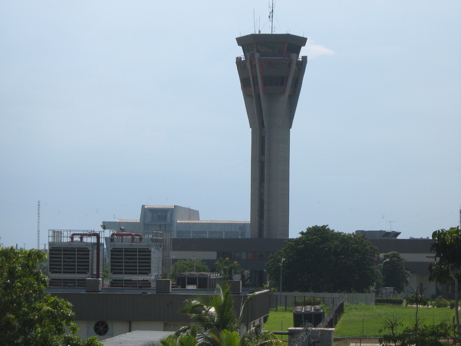 Torre de control del aeropuerto de La Habana